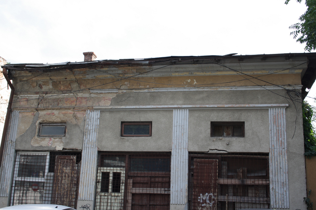 Casă, Str. Sevastopol 14 sector 1